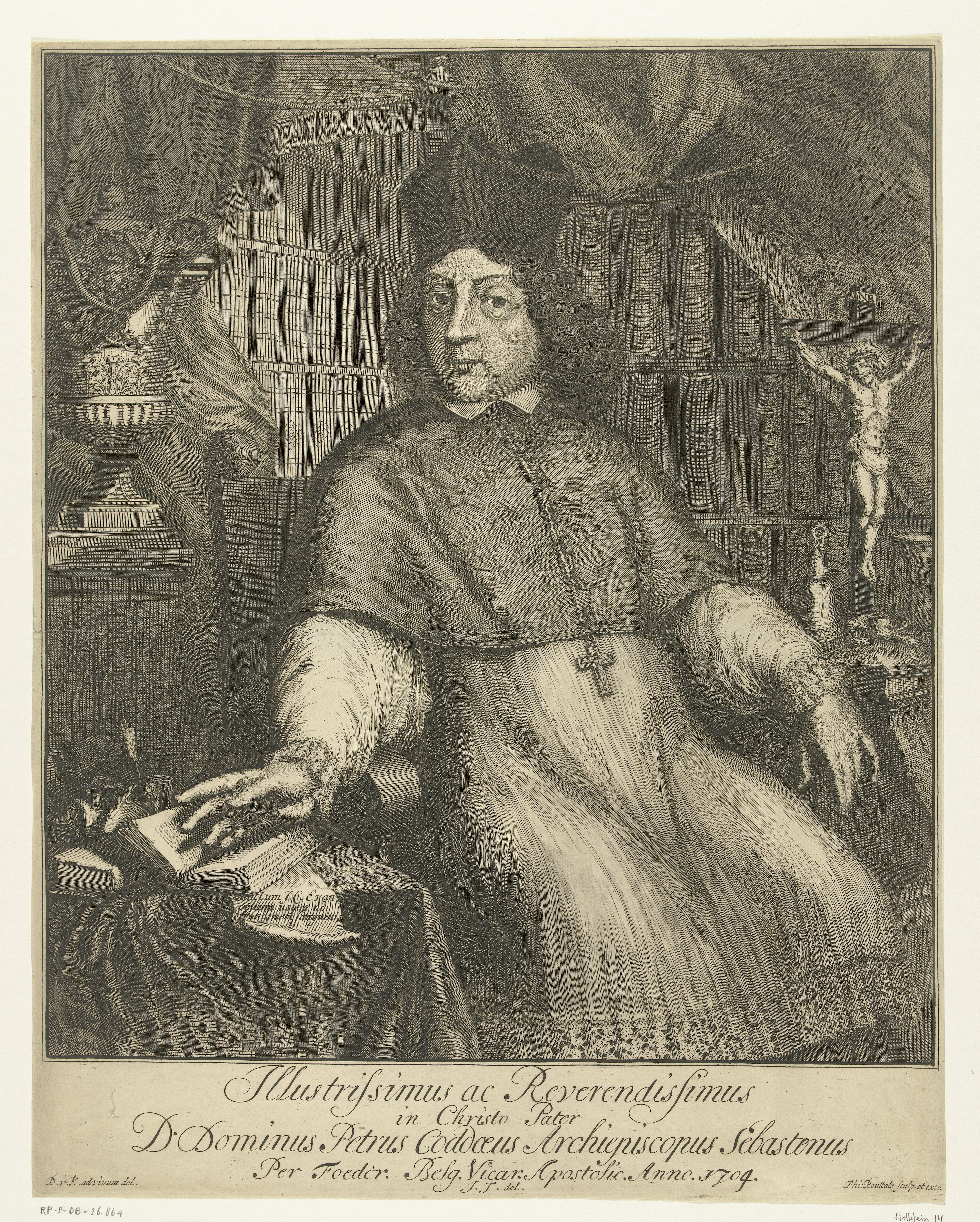 IdentificatieTitel(s): Portret van Petrus Codde, aartsbisschop van UtrechtObjecttype: prent Objectnummer: RP-P-OB-26.864Catalogusreferentie: Hollstein Dutch 14Opschriften / Merken: verzamelaarsmerk, verso midden onder, gestempeld: Lugt 2228signatuur, rechtsonder in de marge, gegraveerd: ‘Phi Bouttats sculp. et excu.’signatuur, linksonder in de marge, gegraveerd: ‘D.v. K. ad vivum del’signatuur, midden onder in de marge, gegraveerd: ‘J.J. del’onderschrift, midden onder in de marge, gegraveerd: ‘Illustrissimus ac Reverendissimus....D. Dominus Petrus Coddoeus Archiepiscopus Sebastenus....Anno 1704’Omschrijving: Portret van Petrus Codde, aartsbisschop van Utrecht, zittend in een stoel in een studeervertrek. Naast hem op een tafeltje enkele boeken, schrijfgerei en een stuk papier met de tekst: 'Sanctum J.C. Evangelium usque ad effusionem sanguinis'. Daarachter een sokkel Waar: op een ornamentale vaas. Rechts een tafel waarop een bel, een doodshoofd, zandloper en crucifix. Achter zijn rug een boekenwand. De prent heeft een Latijns onderschrift.VervaardigingVervaardiger: prentmaker: Philibert Bouttats (I) (vermeld op object)naar tekening van: Monogrammist DVK (vermeld op object)naar tekening van: Monogrammist JJ (inventor) (vermeld op object)uitgever: Philibert Bouttats (I) (vermeld op object)Datering: 1704Fysieke kenmerken: ets en gravureMateriaal: papier Techniek: etsen / graveren (drukprocedé)Afmetingen: plaatrand: h 454 mm × b 360 mmOnderwerpWat: historical person (CODDE, PETRUS) - historical person (CODDE, PETRUS) portrayed alonearchbishop, bishop, etc. (Roman Catholic)study; 'studiolo'; librarywriting accessoriesbookmeditation over skull and/or crucifixWie: Petrus CoddeVerwerving en rechtenVerwerving: onbekendCopyright: Publiek domein